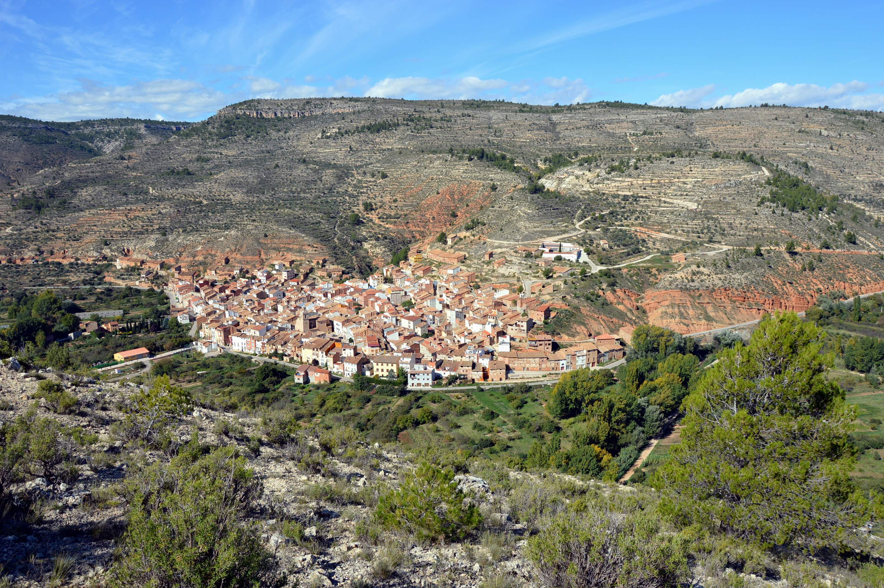 Vista general (nororiental) de Casasbajas (Valencia), desde el cerro frontero.